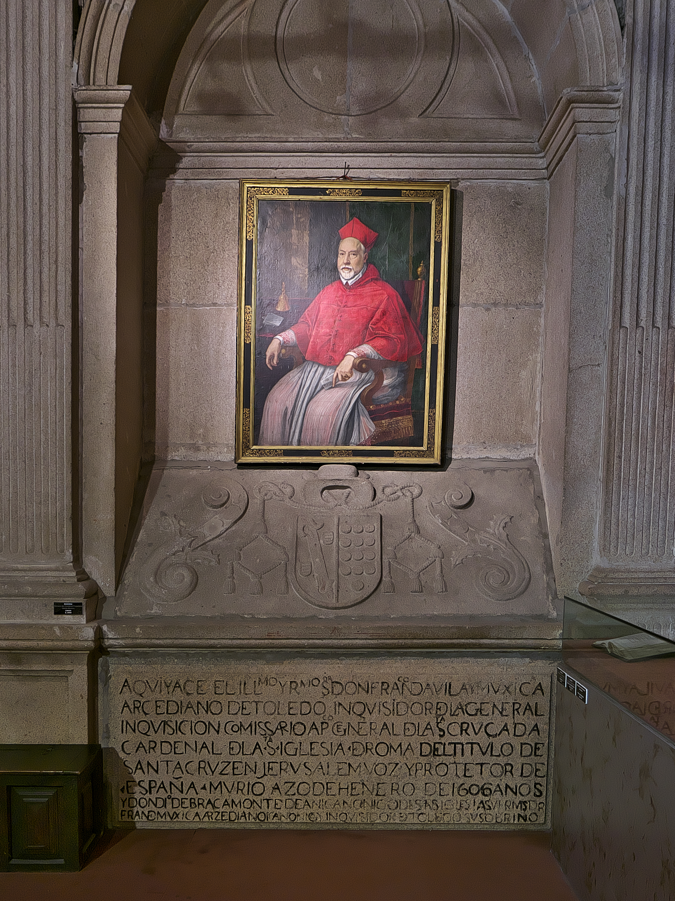 Sepulcro de Francisco Dávila Mújica y de Garcibáñez de Mújica y Bracamonte (†1606), arcediano de Toledo, inquisidor y comisario general de cruzada, cardenal de Santa Cruz de Jerusalén. Fundador de esta capilla funeraria, llamada del Cardenal, para la familia Mújica-Bracamonte.